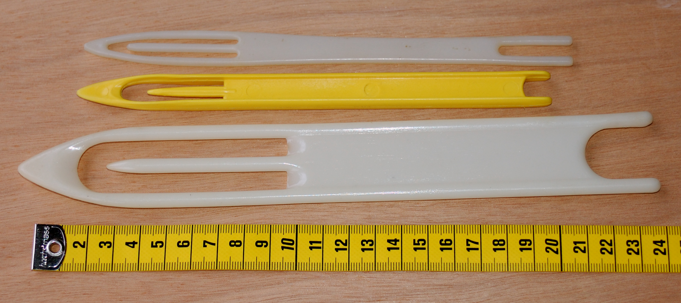 Netznadel